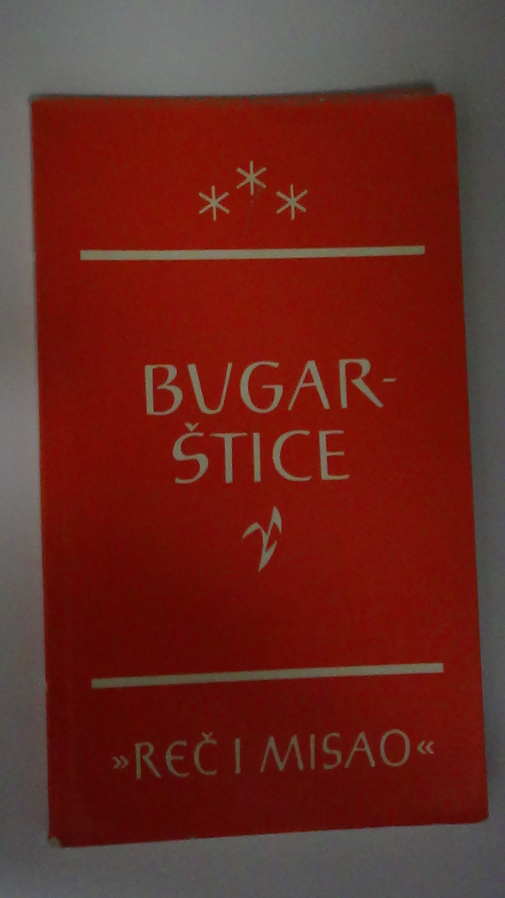 „Бугарштици“, Рад, Белград, 1969.